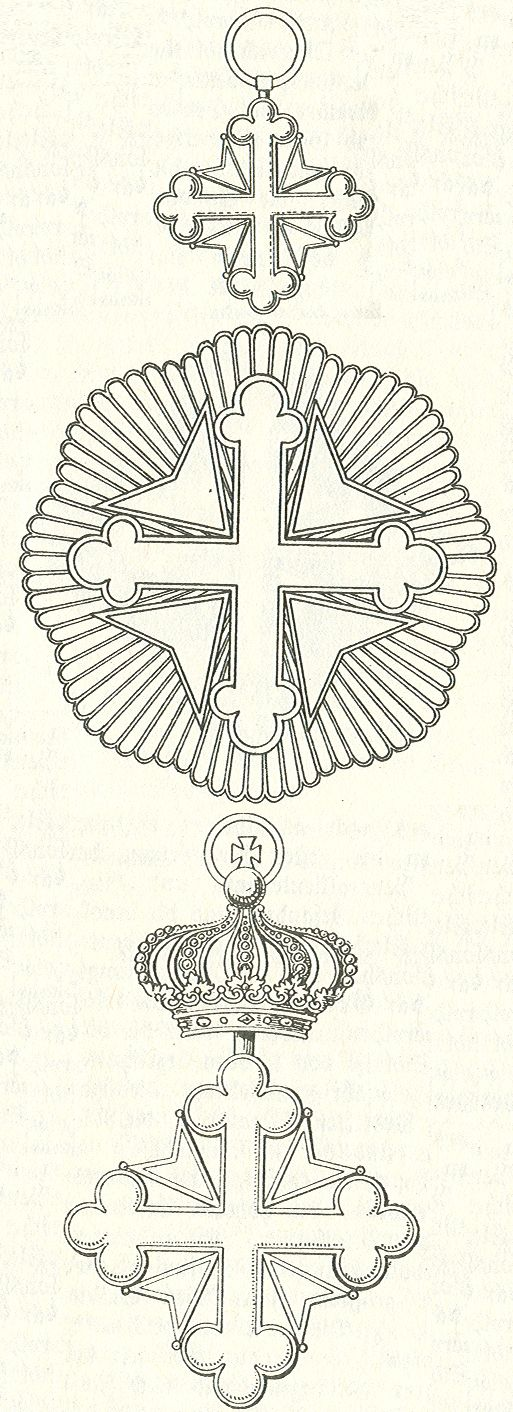 Scan van Blz. 168 en 169 van het boek "Handbuch der Ritter- und Verdienstorden " uitgegeven 1893 door Weber.Tekening van de in 1902 overleden Maximilian Gritzner. Robert Prummel 10 jul 2008 16:40 (CEST)